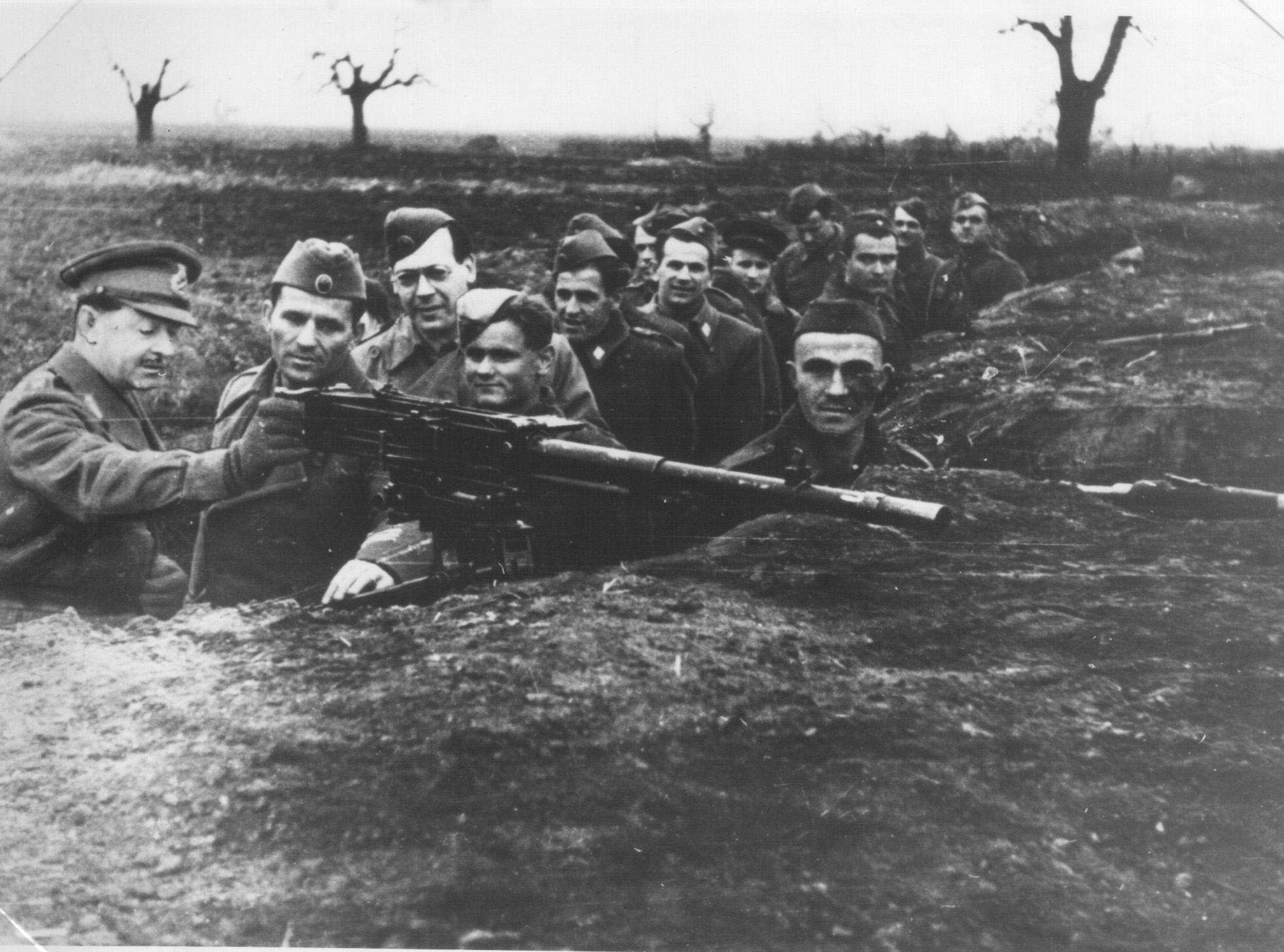 Srpskohrvatski / српскохрватски: Feldmaršal Aleksander na Sremskom frontu, u pratnji Peka Dapčevića i Vladimira Velebita.